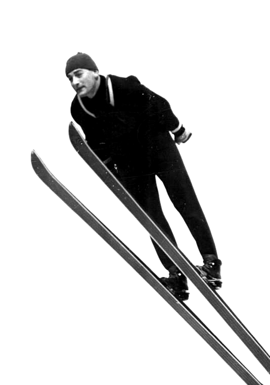 Zentralbild Schaar 27.12.1962 Springer-Auftakt mit Sieg des Weltmeisters Recknagel Die Springer-Saison der DDR begann am zweiten Weihnachtsfeiertag (26.12.62) auf der Thüringen-Schanze in Oberhof mit einem Sieg des Weltmeisters. Helmut Recknagel steigerte sich von Sprung zu Sprung und konnte mit einem prächtigen 73,5-m-Satz im dritten Durchgang seinen bis dahin an Weite überlegenen Klubkameraden Veit Kührt (Sc Motor Zella-Mehlis) noch auf den zweiten Platz verweisen. Recknagels 73,5 m, mit verkürztem Anlauf gesprungen, bedeuteten zugleich größte Weite des Tages. UBz: Veit Kührt (hier beim Sprung) war Recknagels stärkster Konkurrent. Kührt sprang 68, 71 und 67 Meter und erreichte die Note 224,35.